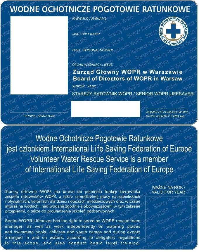 Awers i rewers indentyfikatora WOPR